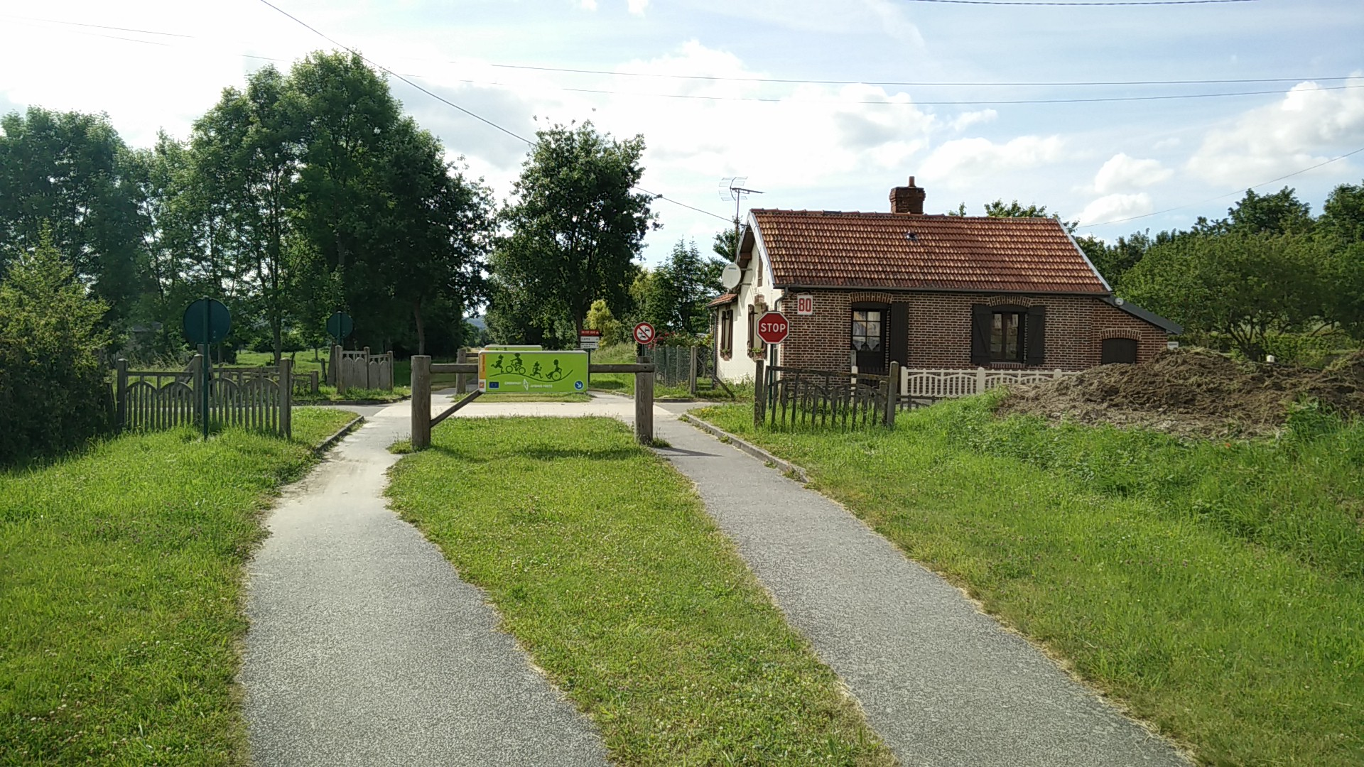 Avenue verte - Mesnières-en-Bray - Ancien passage à niveau